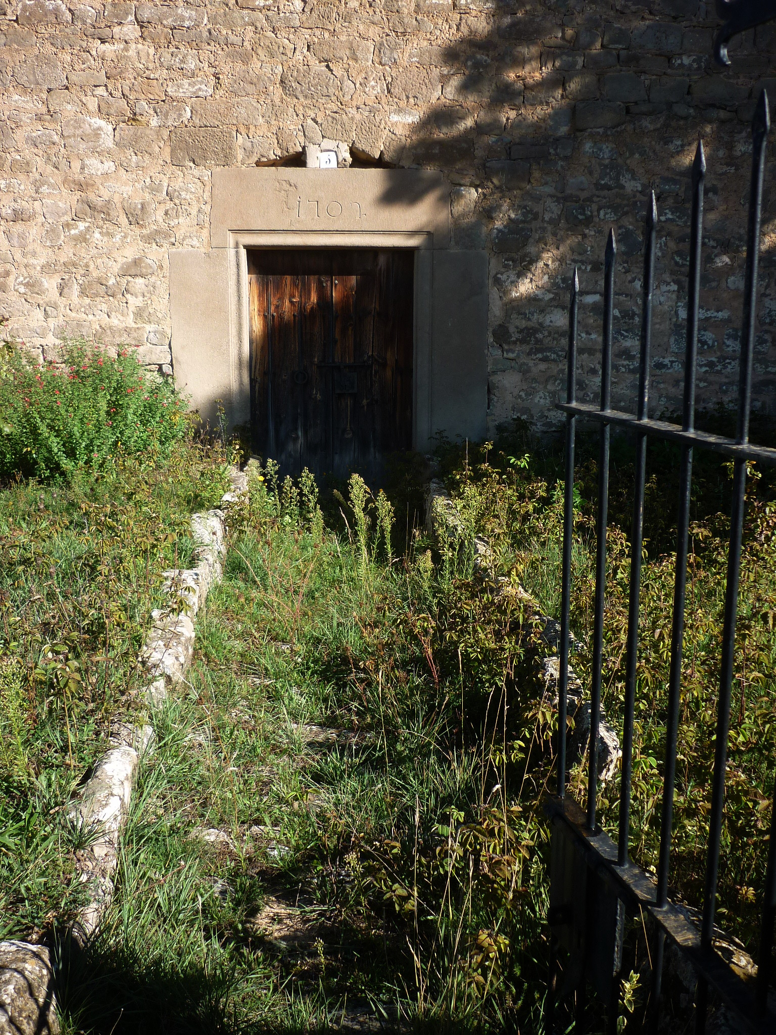 Església de Sant Miquel de Marcinyac (Navès): portal